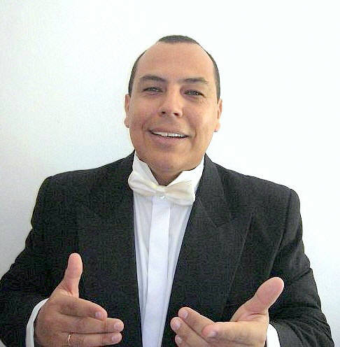 Tenor Edgar Bastidas